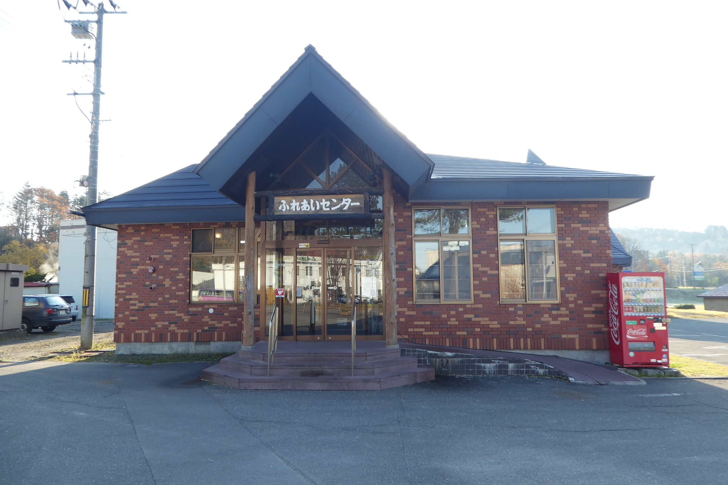 豊富温泉「ふれあいセンター」